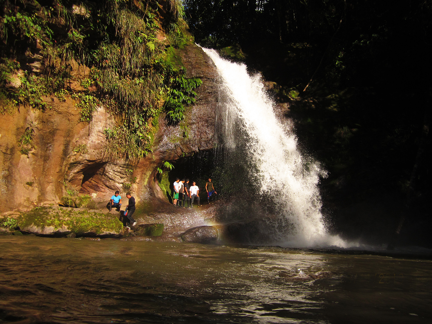 Vista panorámica de la cascada Garganta de Loro